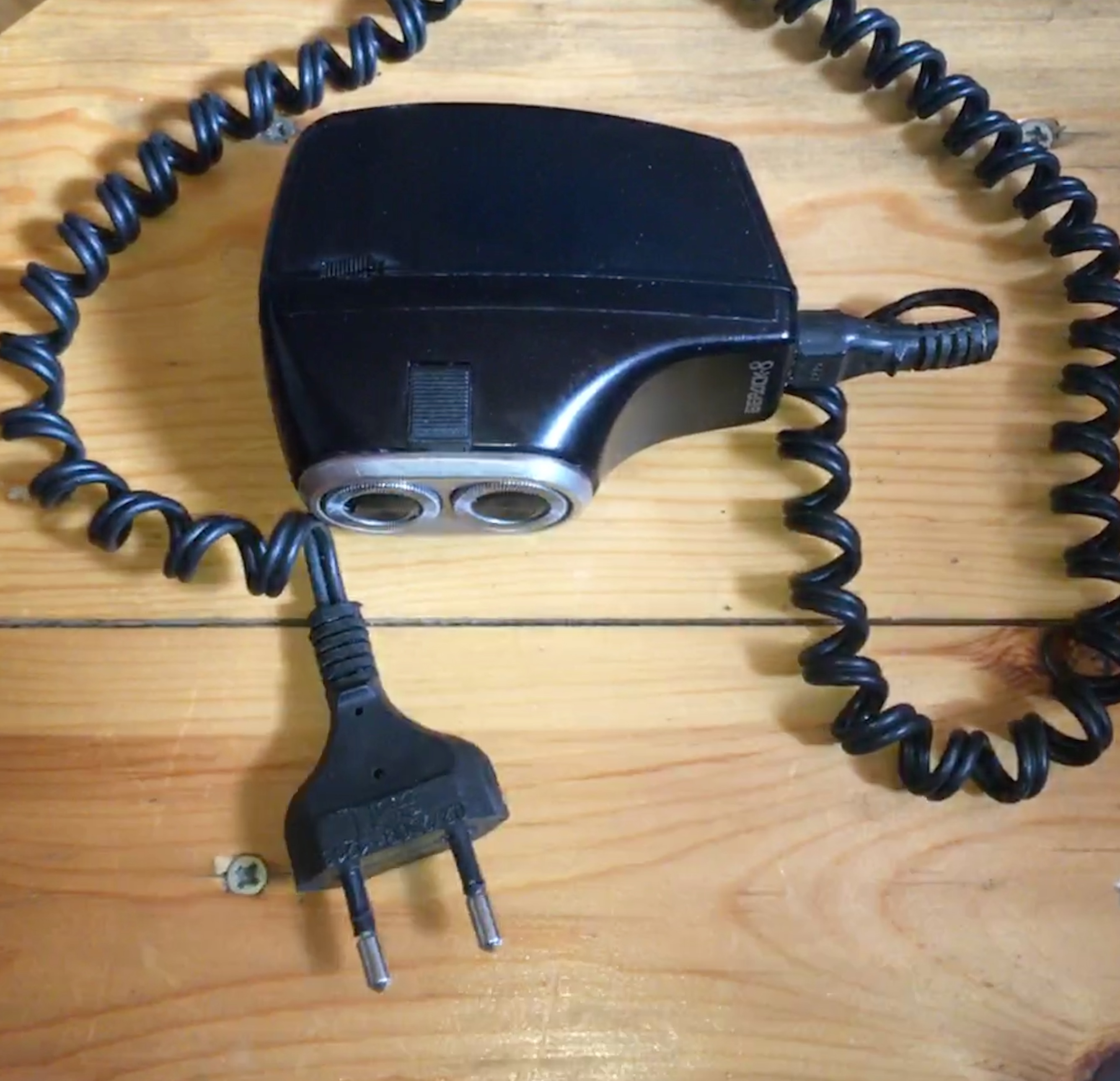 Electric shaver Berdsk